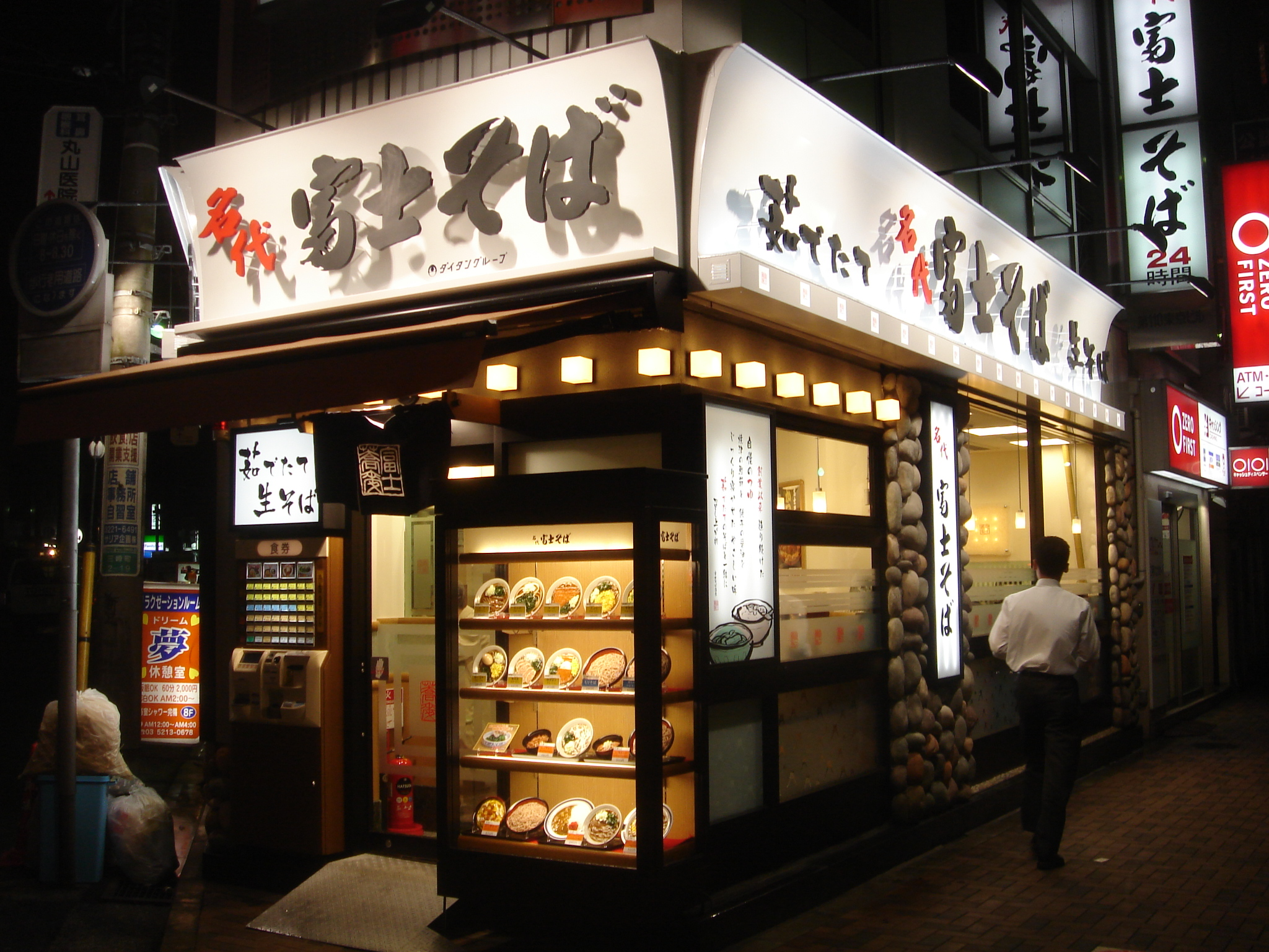 立ち食いそば・うどん店（東京都千代田区三崎町、水道橋駅最寄りの「名代 富士そば」）富士そば